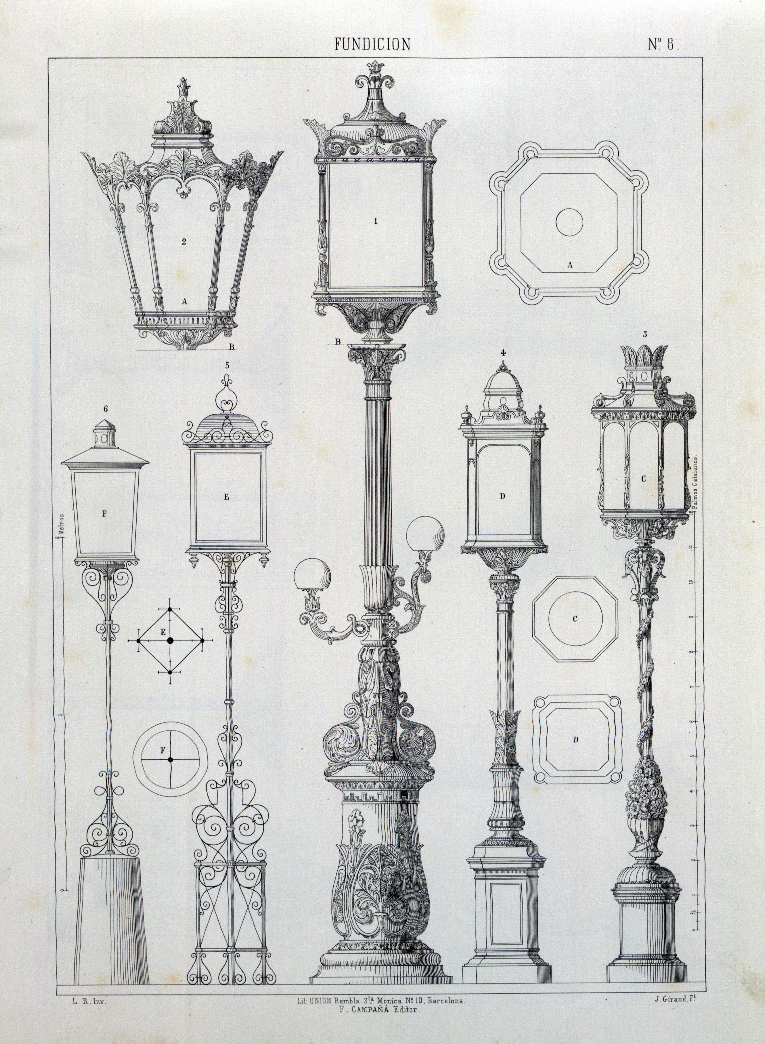 Modelos de farolas, del Album enciclopédico-pintoresco de los industriales (1857), de Lluís Rigalt.